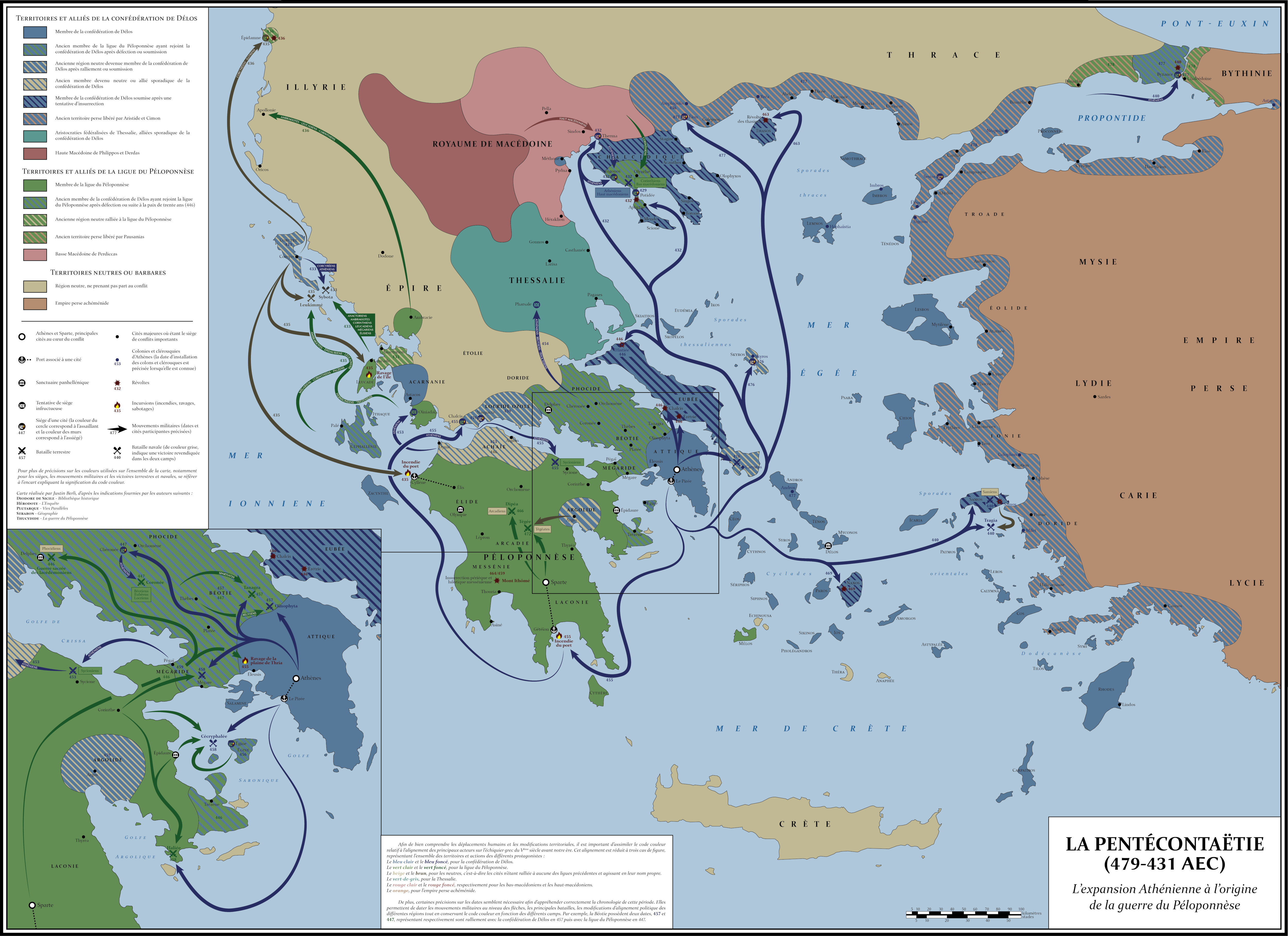 Les épisodes de la Pentécontaëtie: de la fin des guerres médiques au début de la guerre du Péloponnèse.